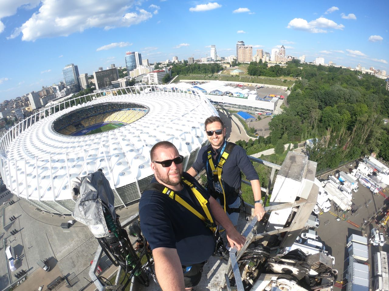 Mitarbeiter der TVN Group am 26. Mai 2018 beim Champions-League-Finale für die Uefa in Kiew.